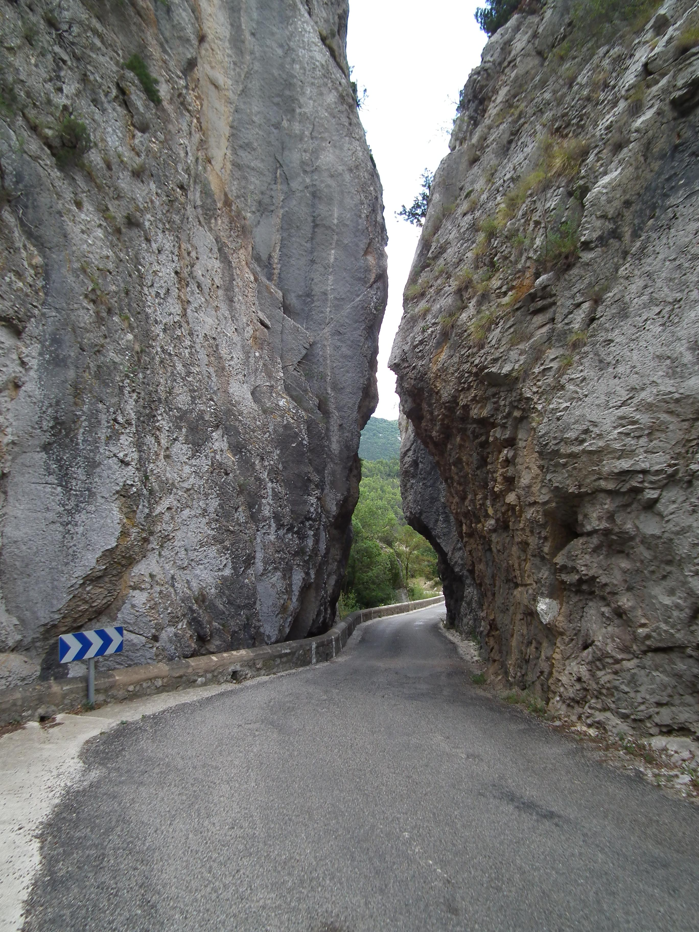 Les gorges de la Clue - Plaisians - Drôme - France